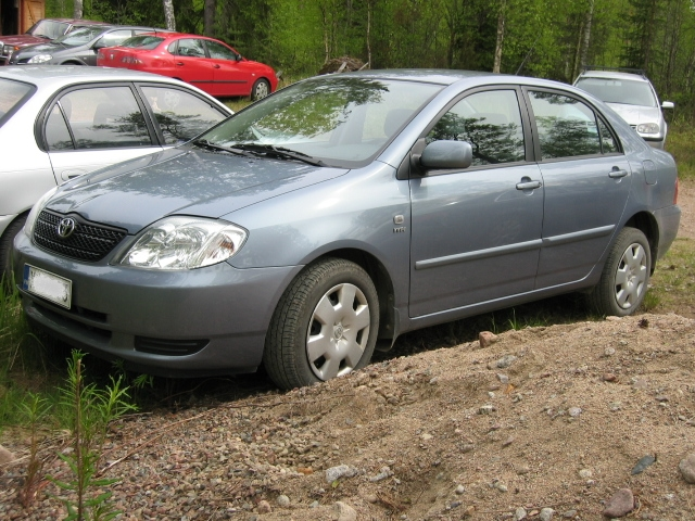 Toyota Corolla